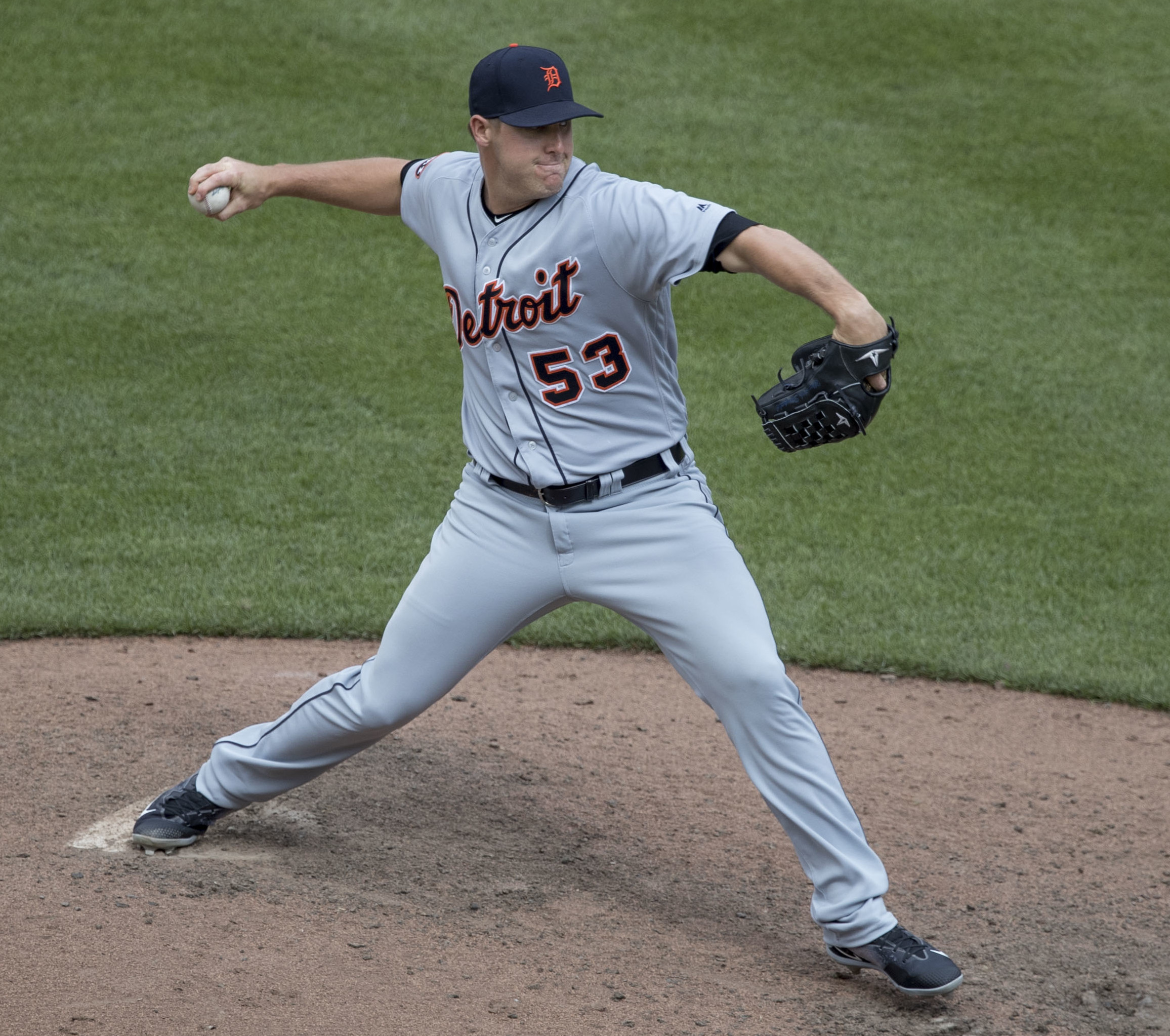 Tigers at Orioles 8/6/17